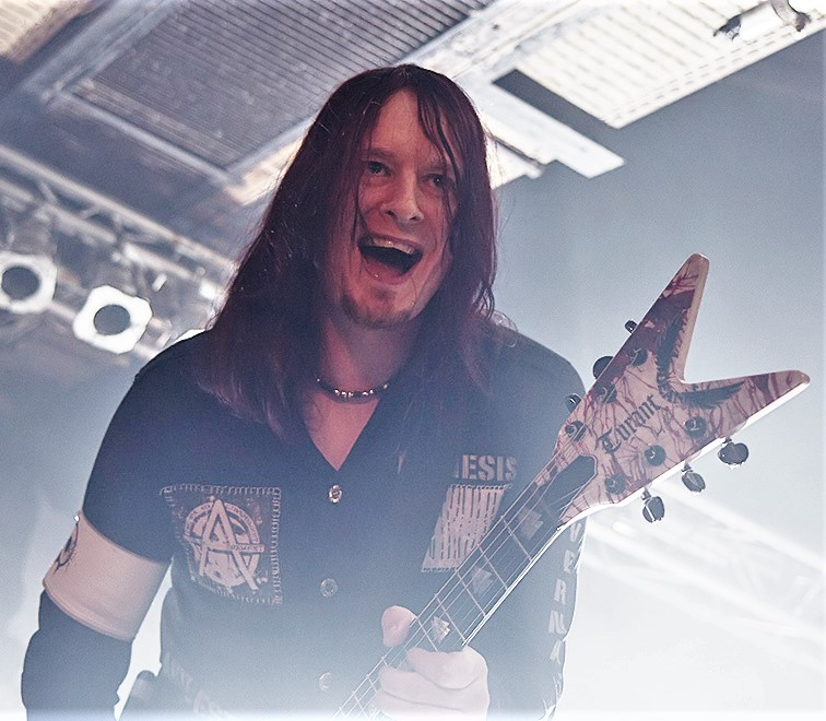 Arch Enemy 17.10.2012 Rockfabrik, Ludwigsburg